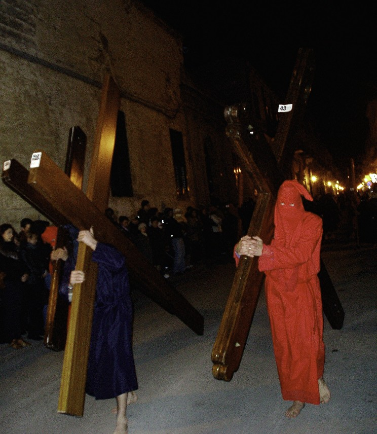 Pappamusci cu lli trai Licensing